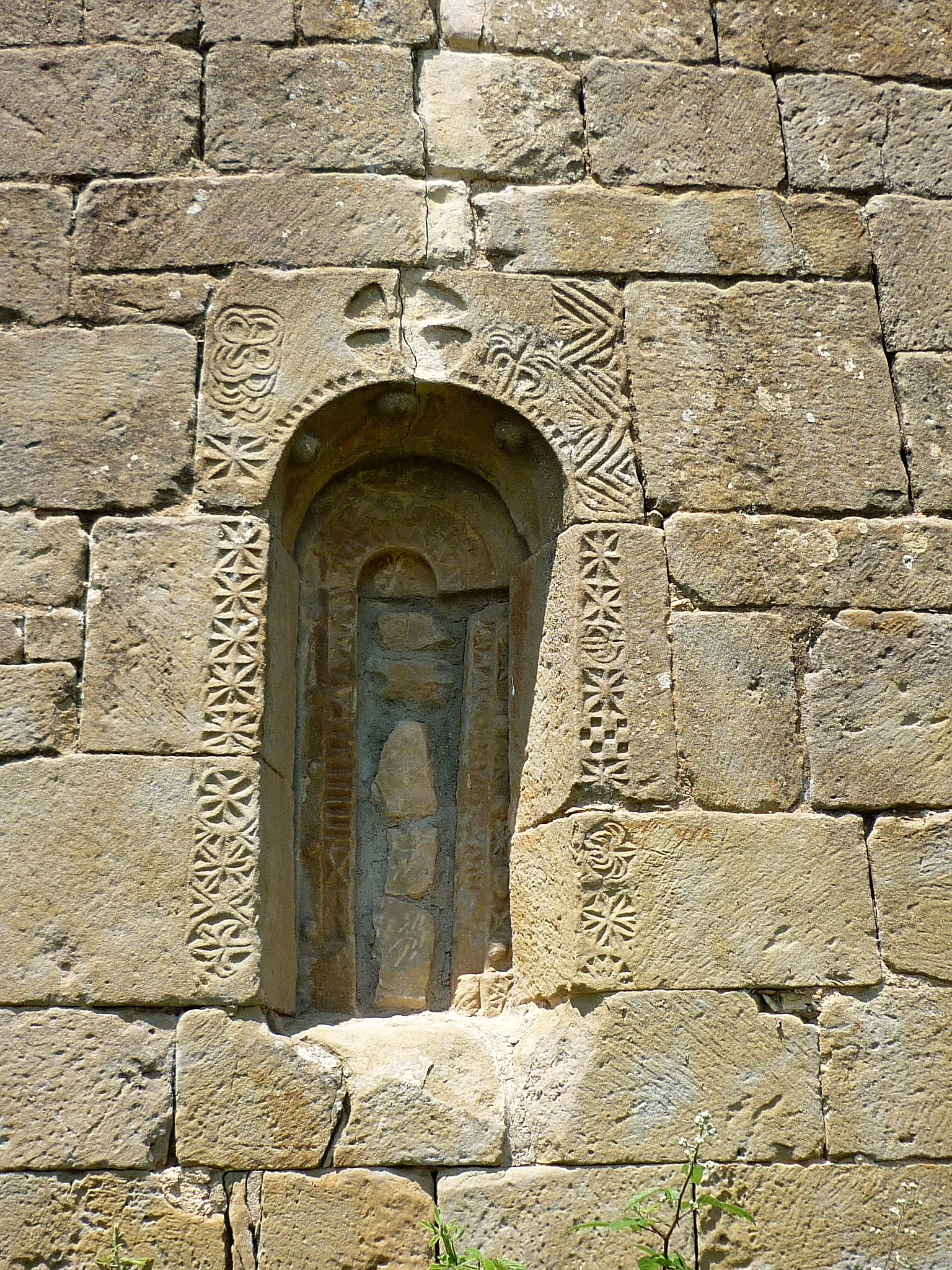 Església de Sant Pere de Llobera: detall d'un finestral